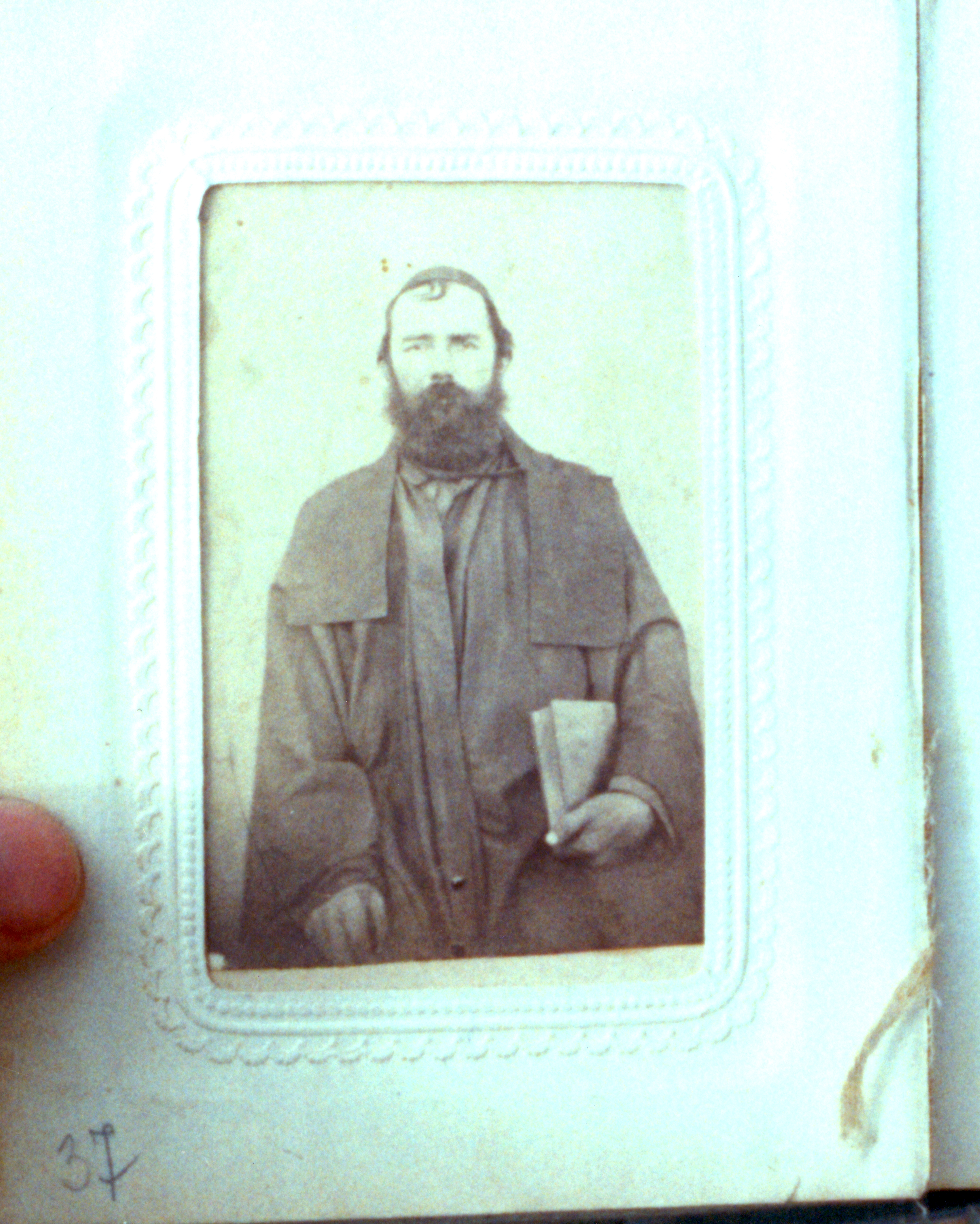 Анатолій Кралицький. Photo taken by Jozafát Vladimír Timkovič, OSBM